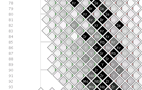 Overzicht van de 16 meest stabiele isotopen van strontium met isotopen van naburige elementen